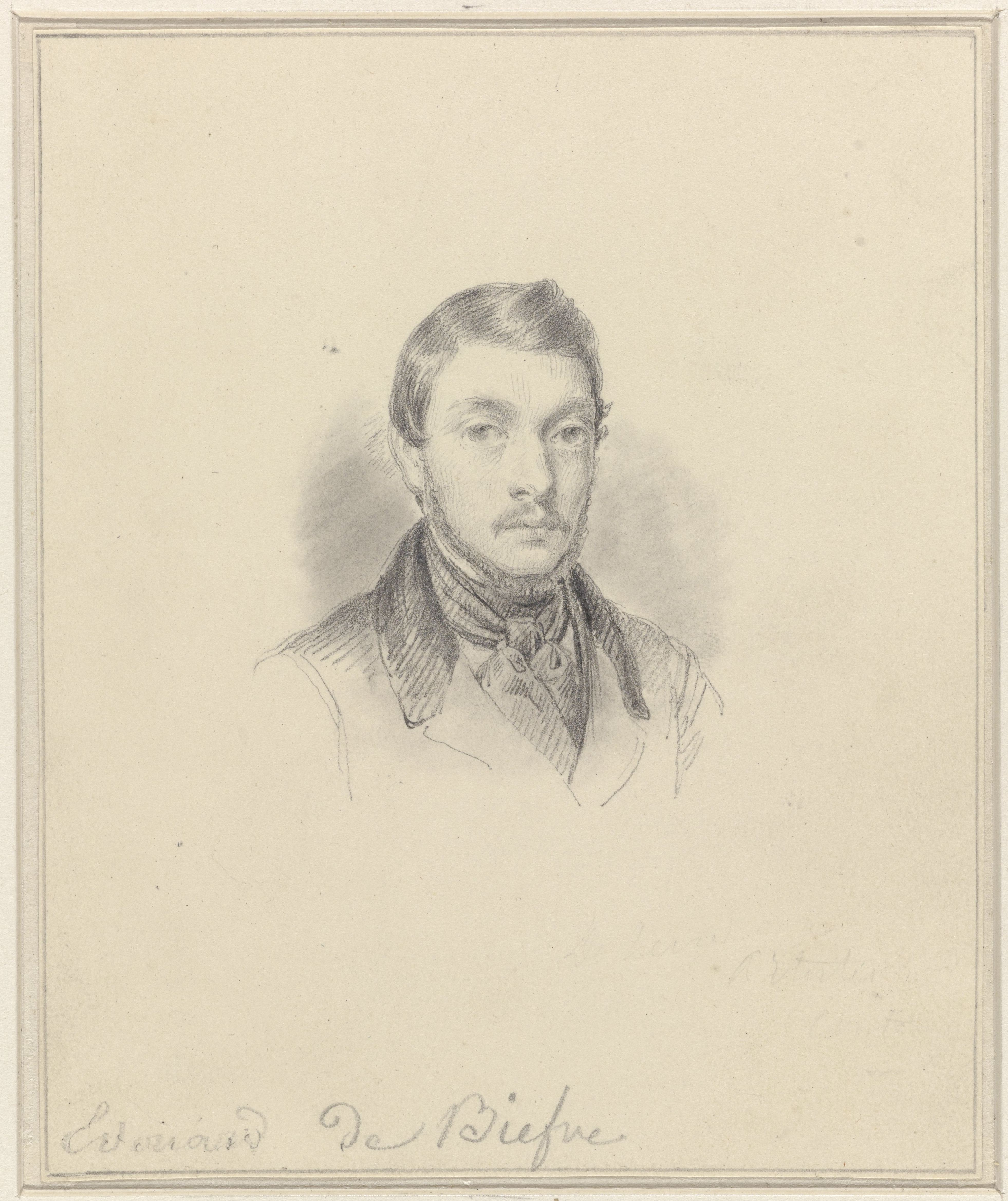 Ontwerp voor een prent.